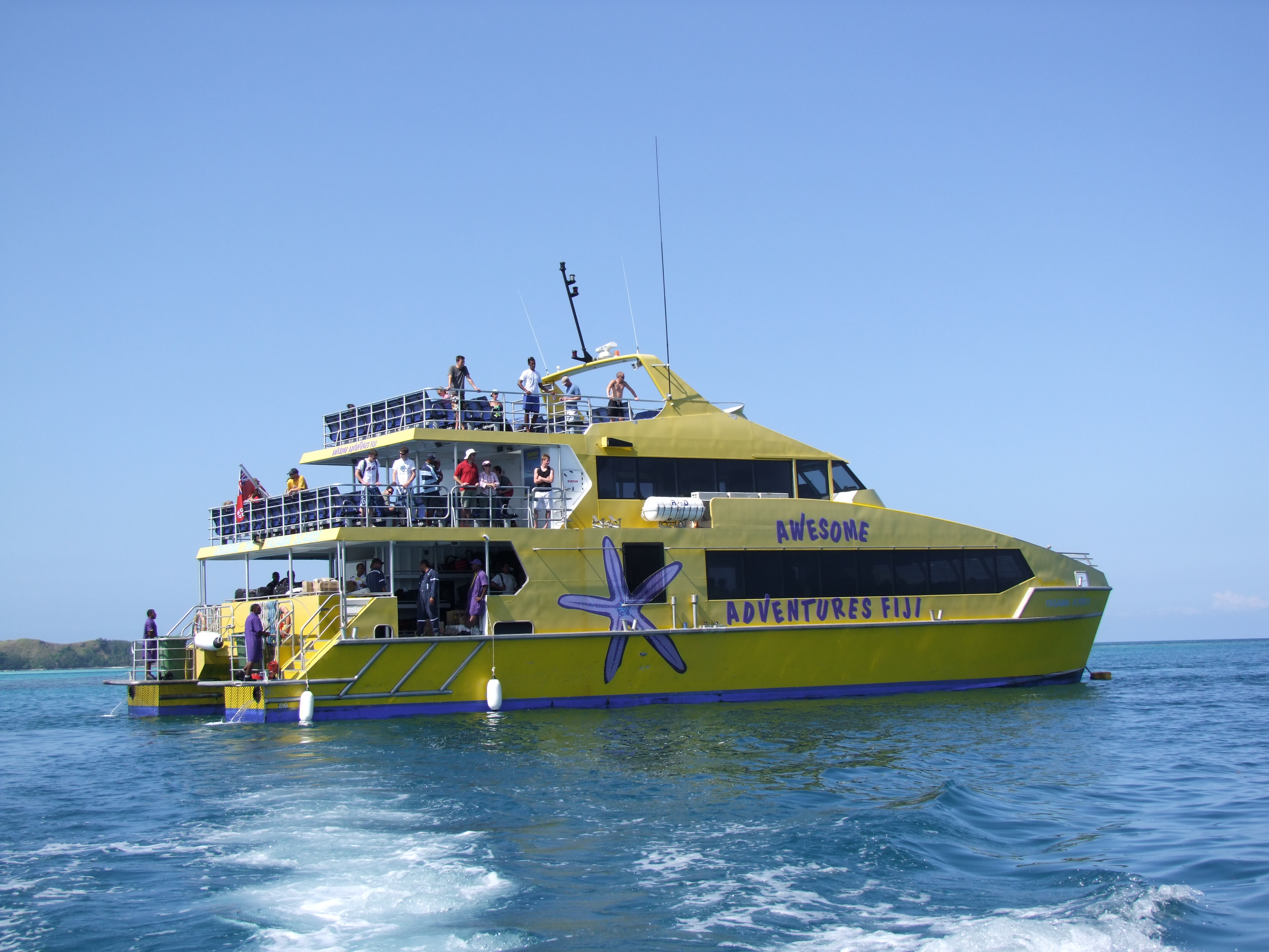 Yasawa Flyer Ferry